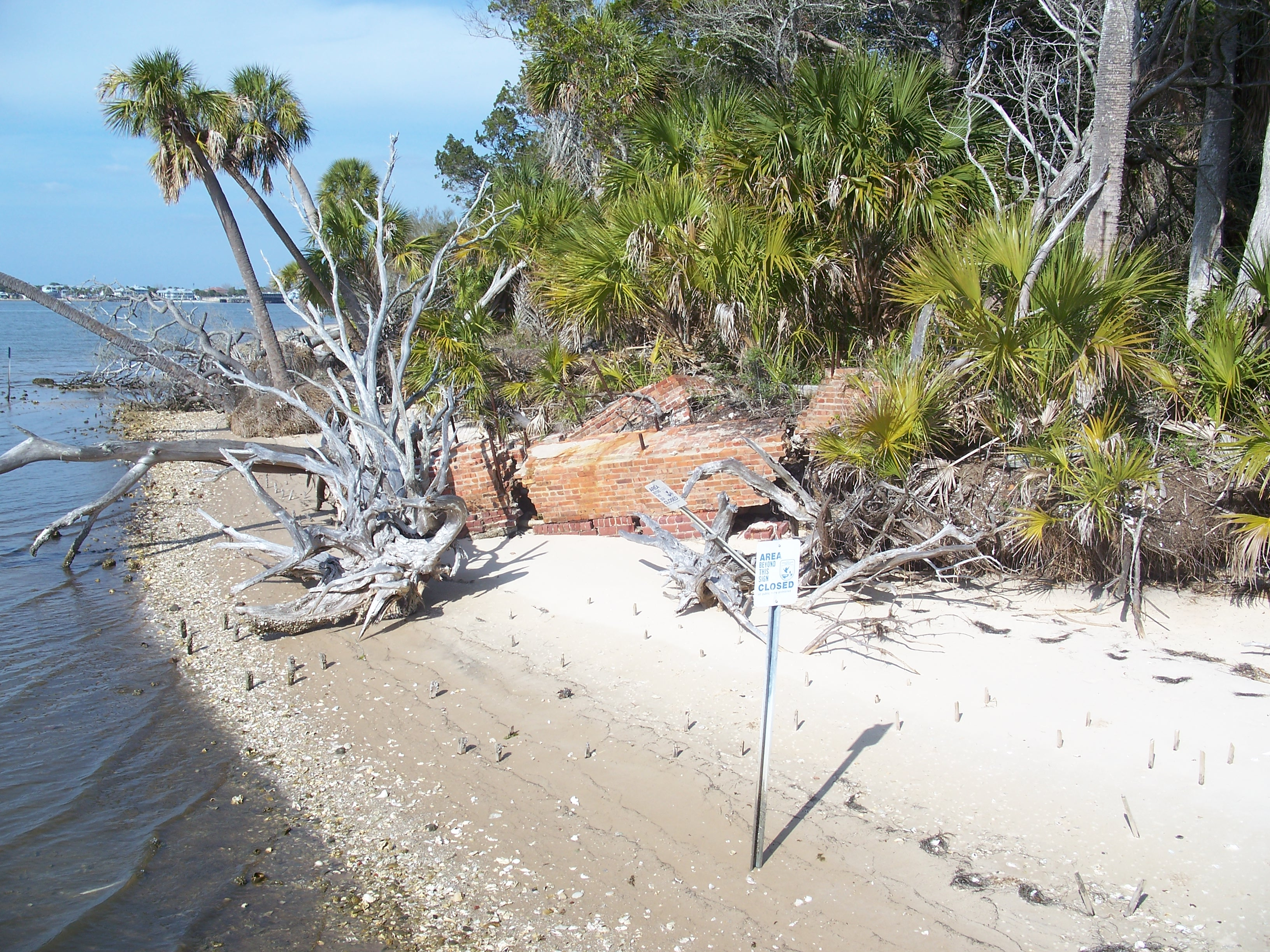 Atsena Otie Key